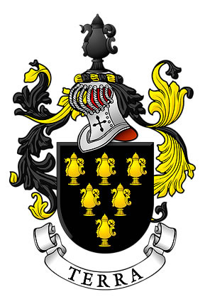 Fig. 1: Armas dos Aertrijcke.